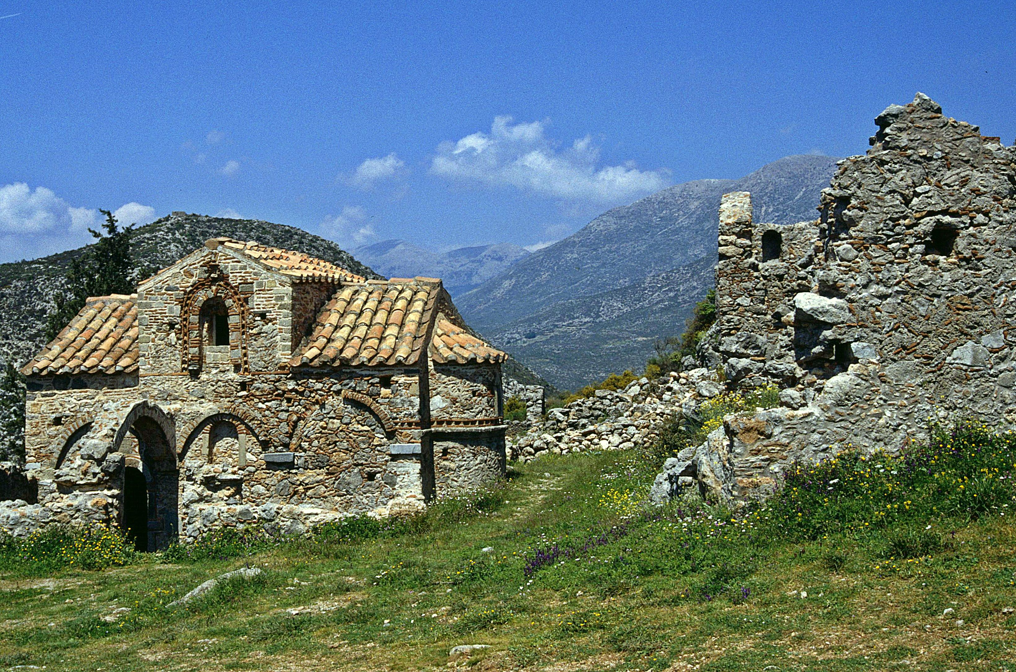 byzantinische Ruinenstadt Geraki